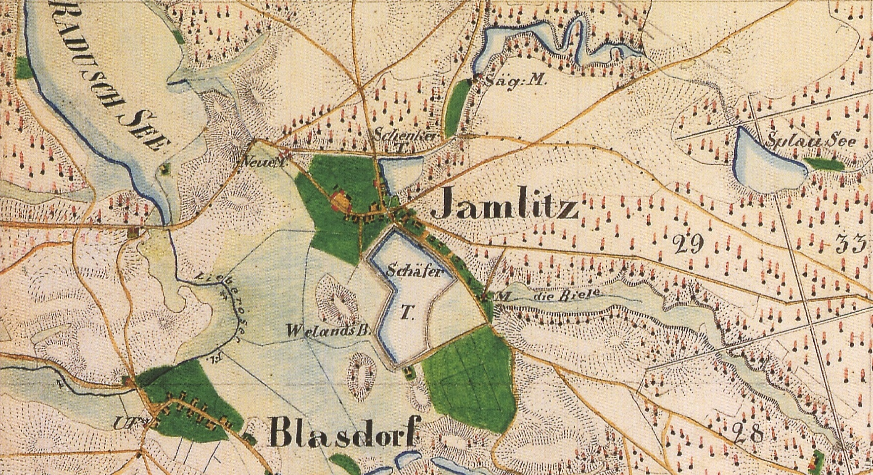 Jamlitz, Amt Lieberose/Pberspreewald, Lkr. Dahme-Spreewald, Brandenburg, Ausschnitt aus dem Urmesstischblatt 4052 Jamlitz